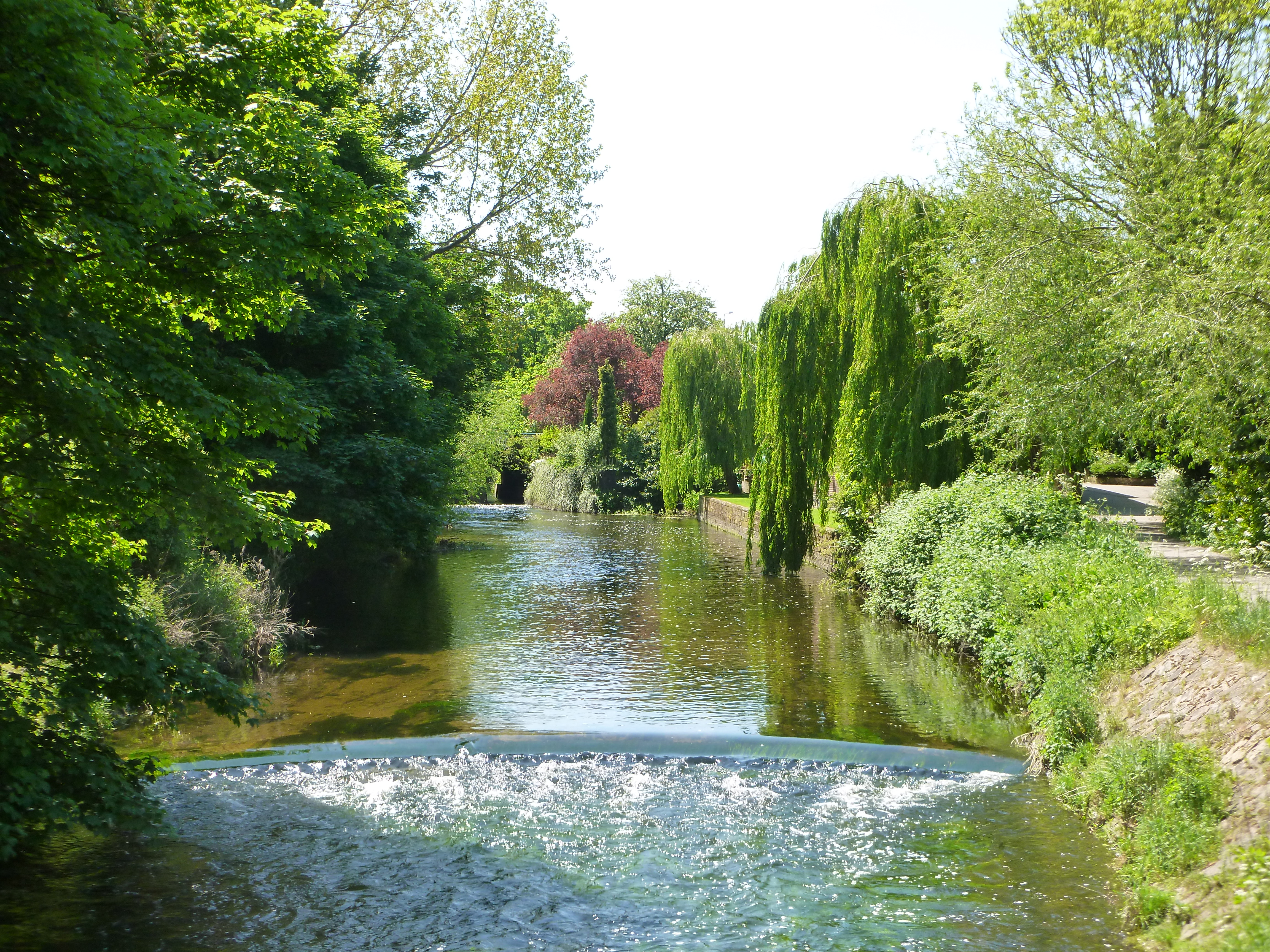 River Idle